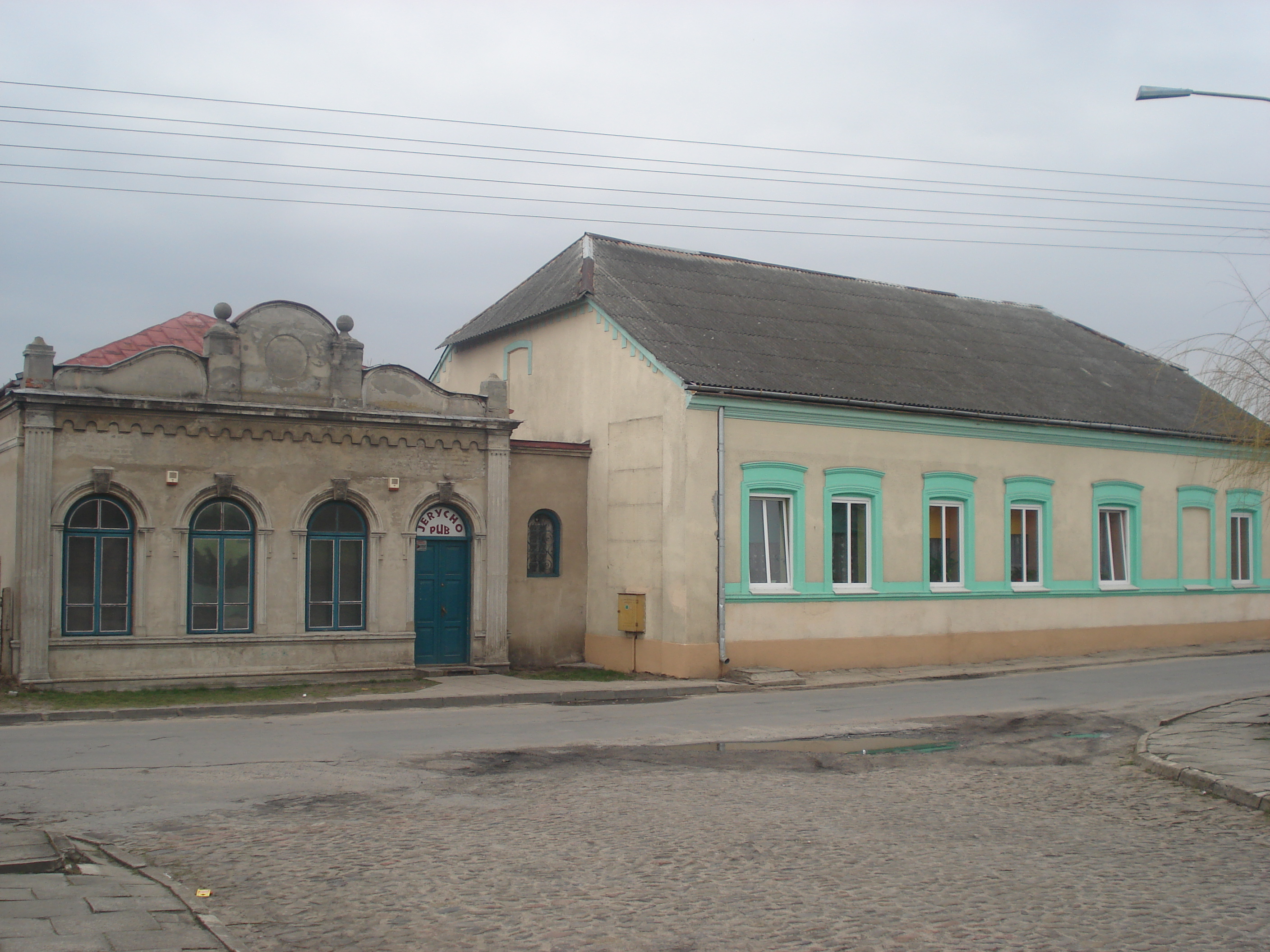 Bóżnica i dom garbarski przy ul. garbarskiej w Szydłowcu